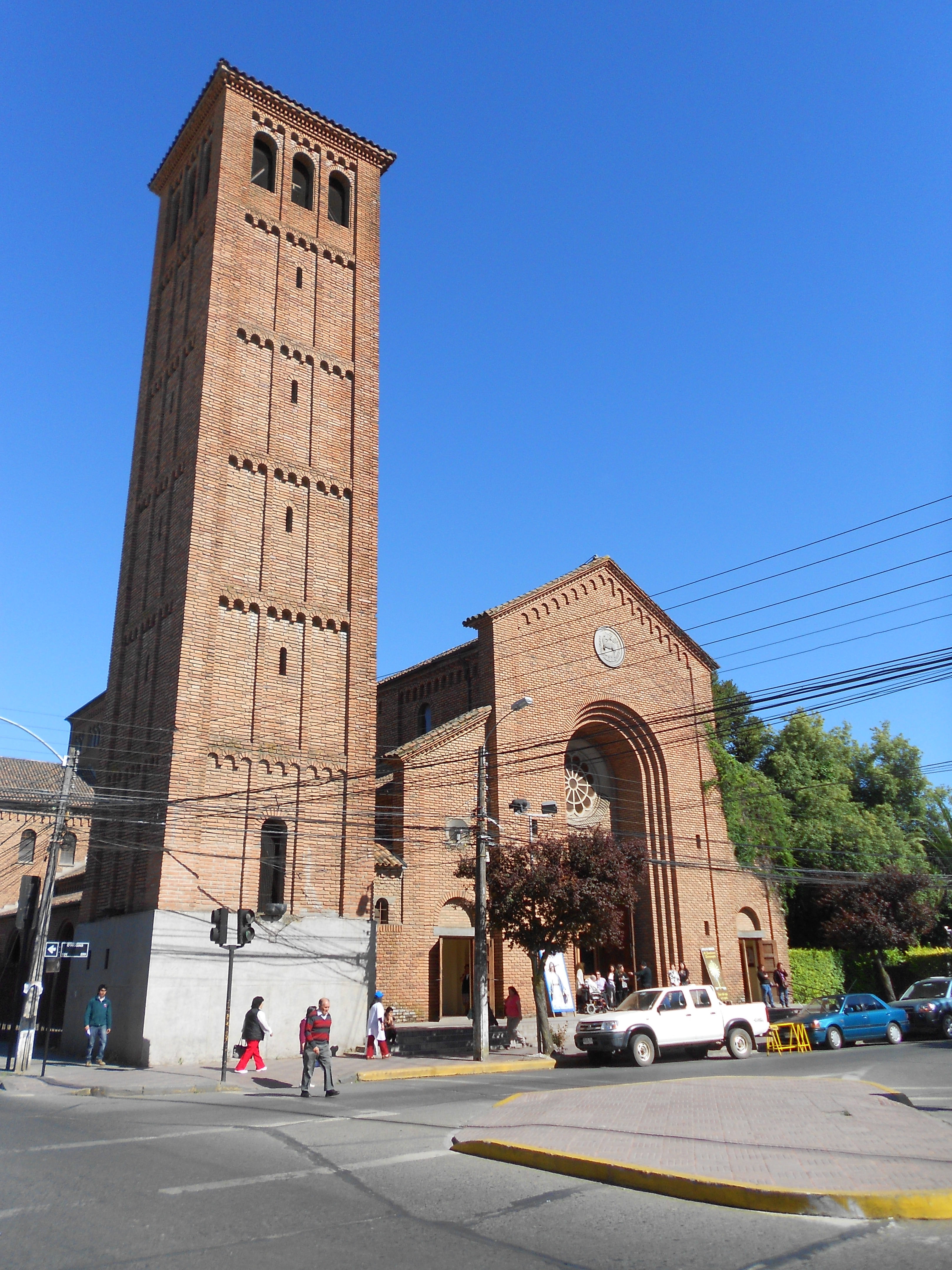 Catedral de Linares en Chile